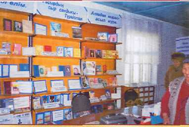 Мақтарал орталықтандырылған кітапханалар жүйесі